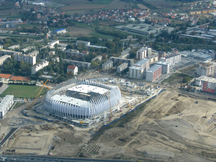 Arena Zagreb from the air (October 2008)